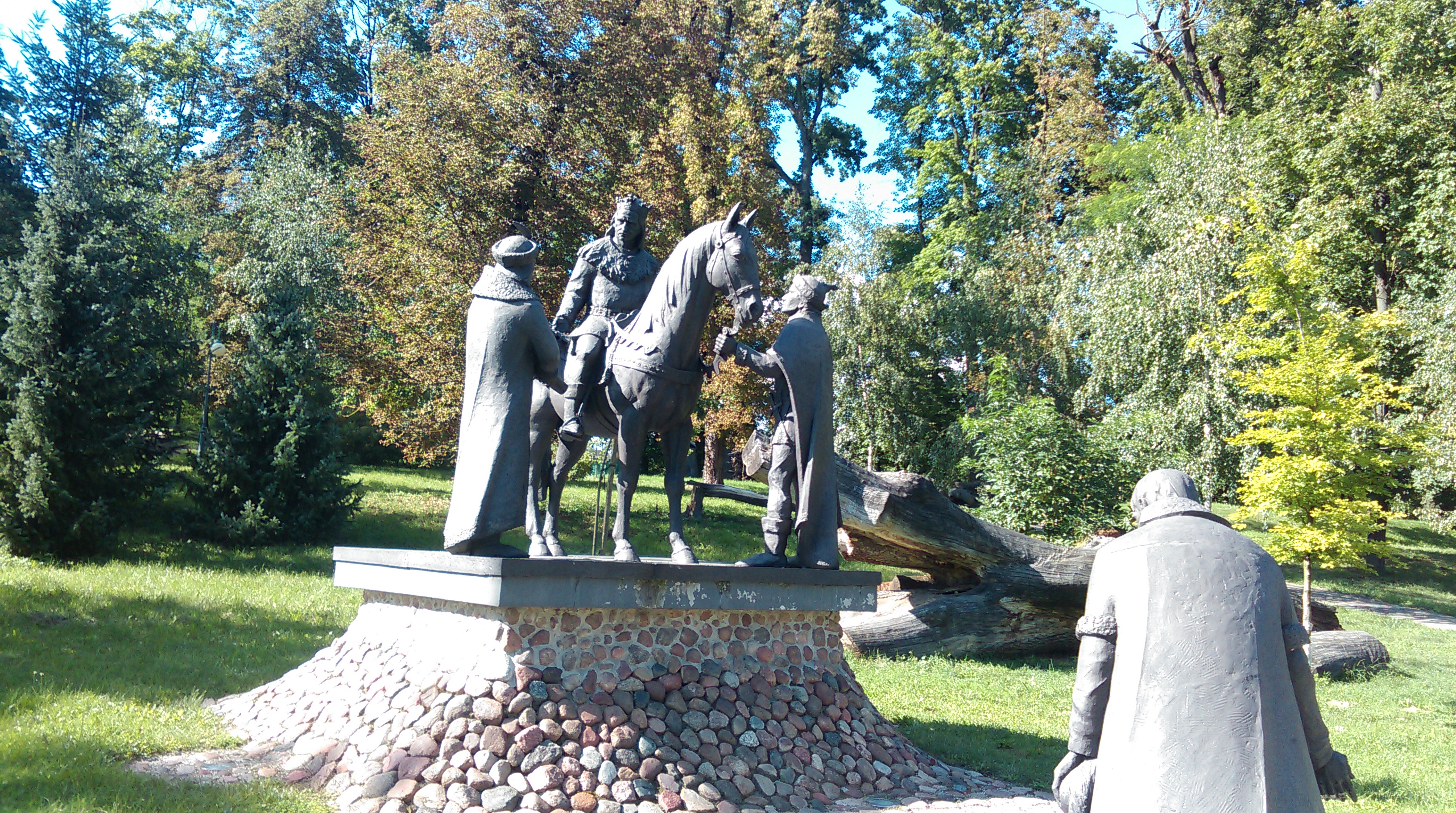 Obszar specjalnej ochrony ptaków: Ostoja Kozienicka This is a photography of protected area with CRFOP ID PL.ZIPOP.1393.N2K.PLB140013.B